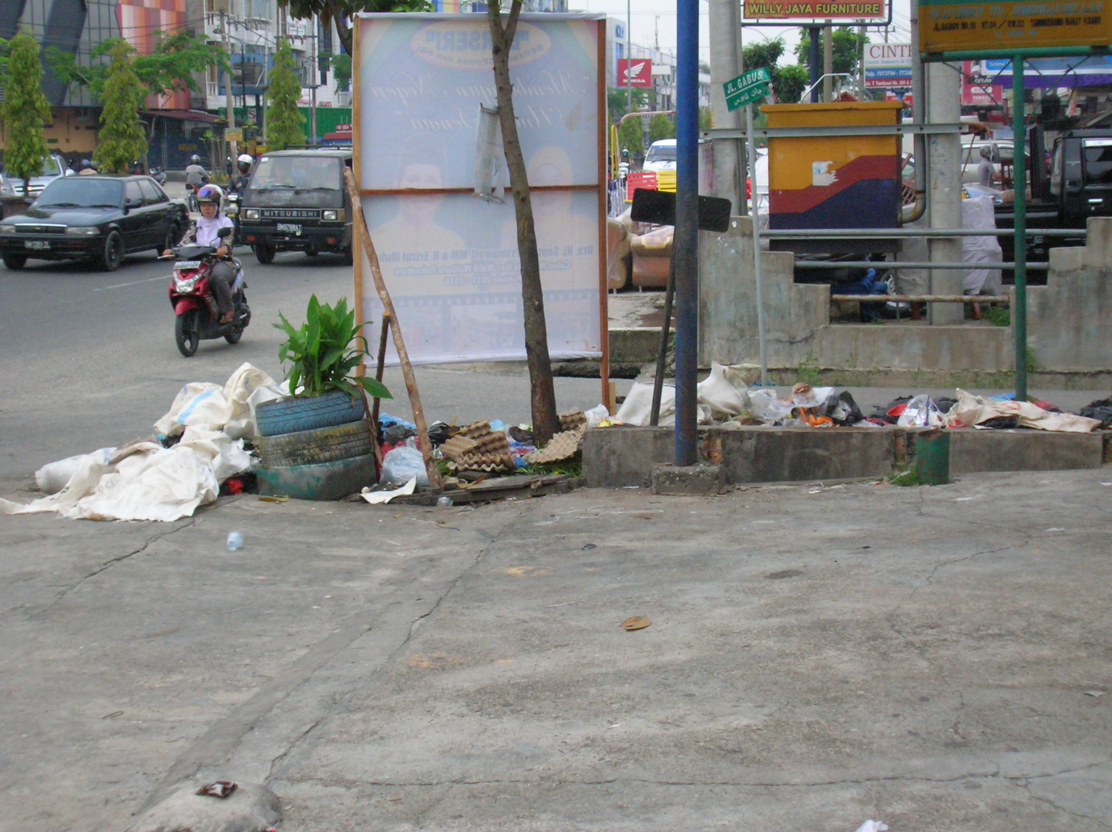 Tumpukan sampah di salah satu sudut jalan besar atau jalan utama di Kota Pekanbaru, Riau, Indonesia. Gambar ini diambil pada tanggal 26 April 2011.